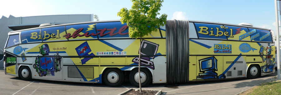 Neoplan N 121/4 „Spacelongliner“ (Unikat), Superhochdecker als Gelenkbus, ehemals Nena-Tourbus, Porsche-Promotionbus, jetzt Bibelinformationsbus mit Multimediaausstattung